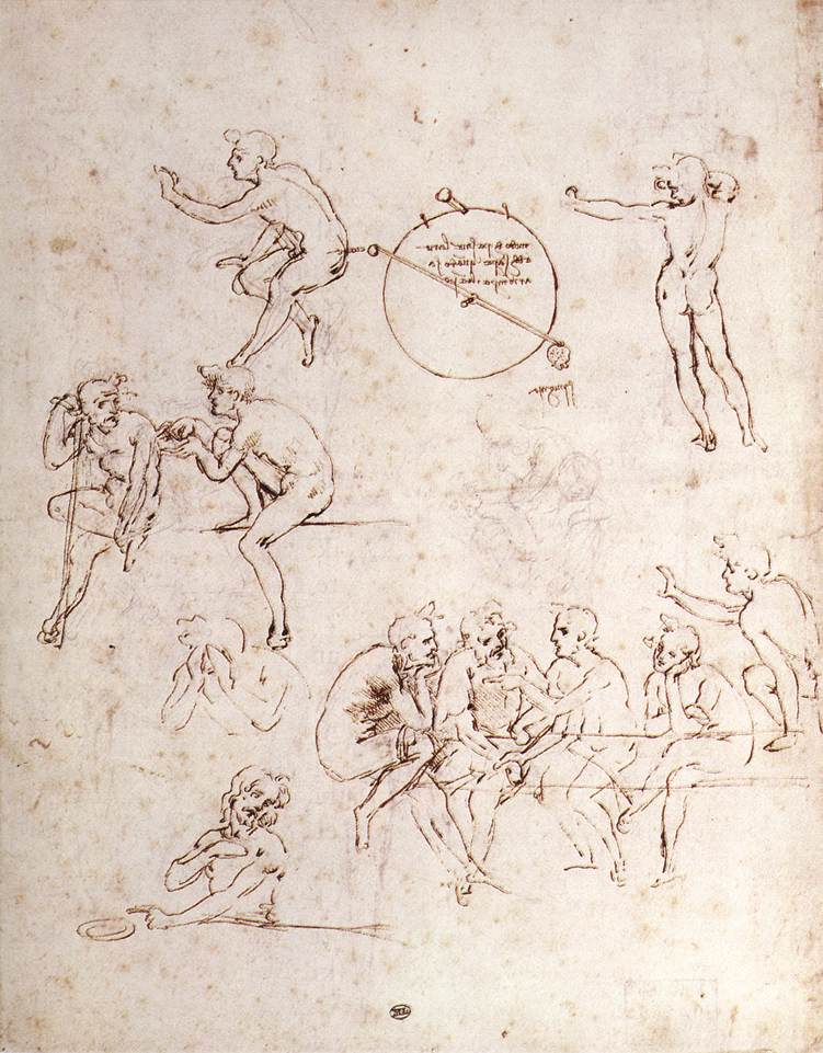 LEONARDO da Vinci Various figure studies Pen and ink on paper, 278 x 208 mm Musée du Louvre, Paris